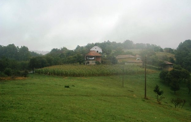 Лескова Бара.